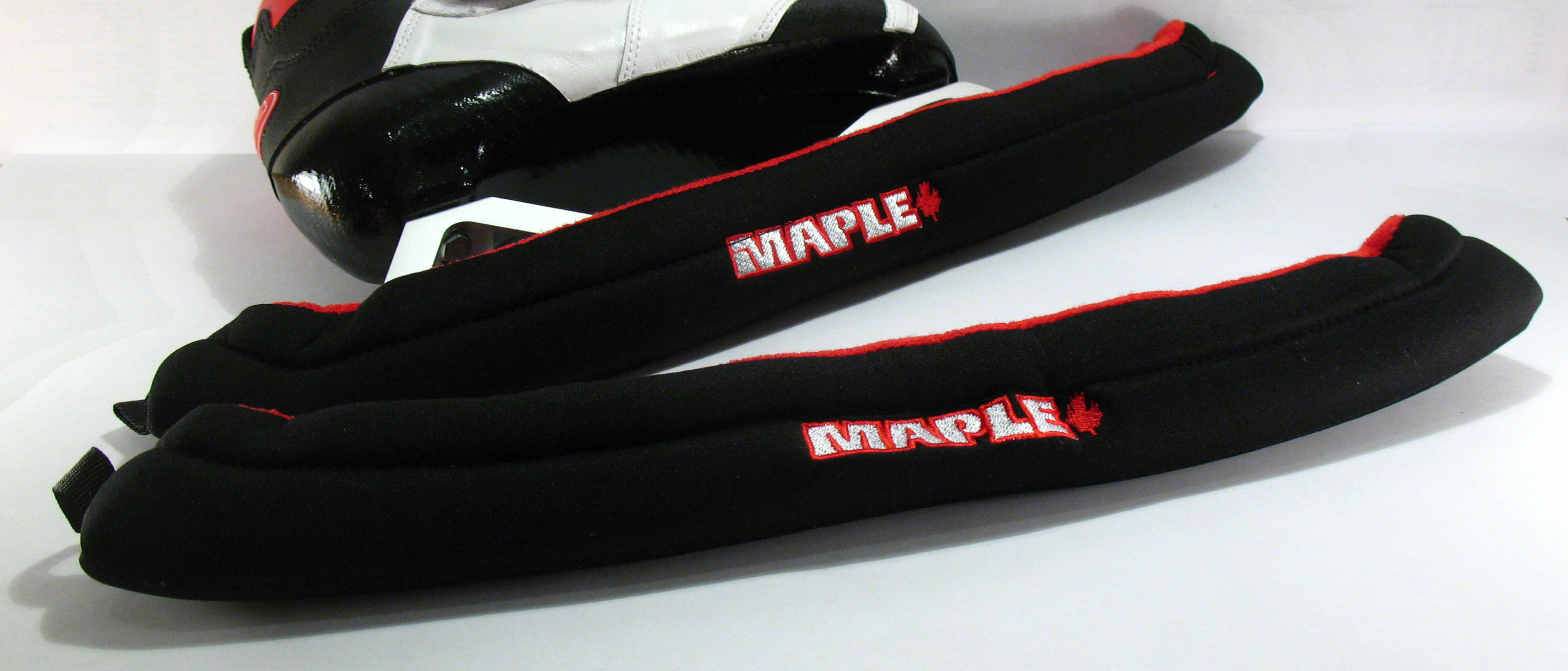 Kufenschoner für Eisschnellaufkufen der Firma Maple Skate